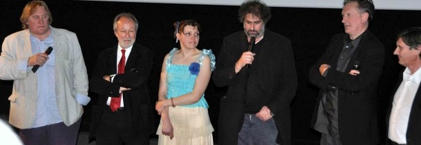 L'équipe du film Mammuth. De gauche à droite, Gérard Depardieu, Jérôme Clément, Miss Ming, Gustave de Kervern, Benoît Delépine, Jean-Pierre Guérin.